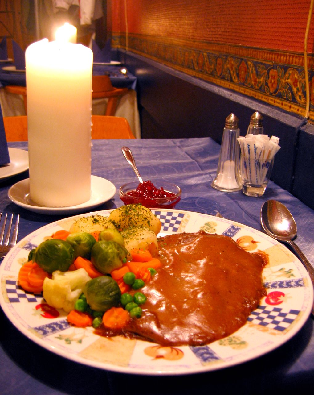 Reinsdyrsteik (Reindeer steak), a Norwegian dish